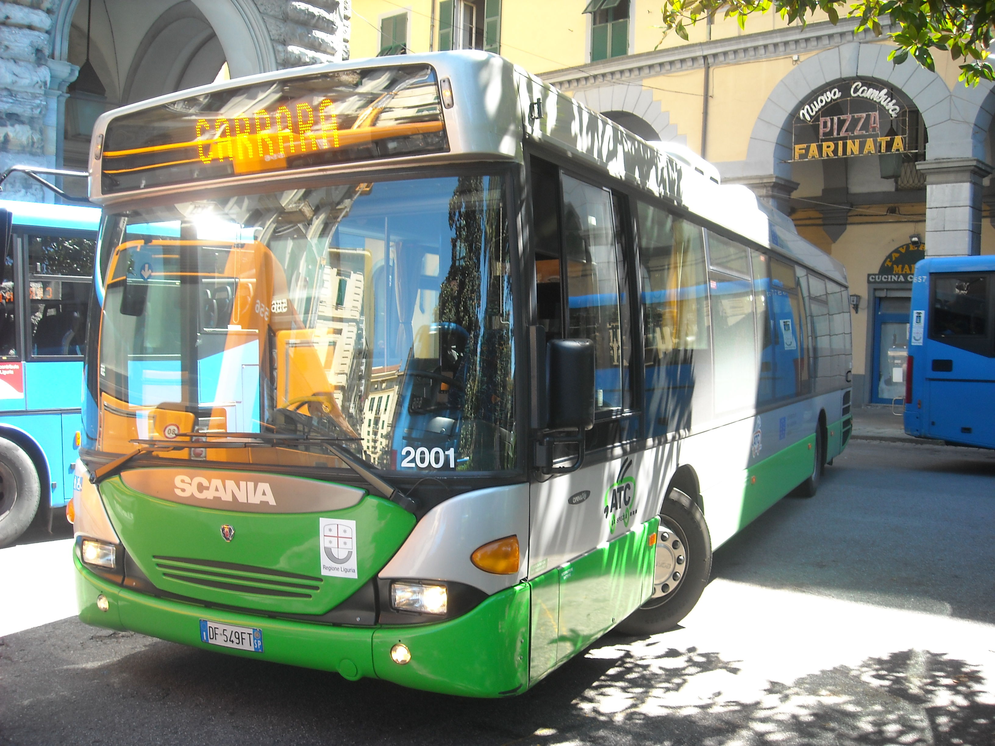 Scania Omnilink Dell'ATC di La Spezia